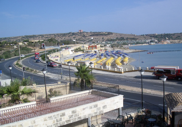 Ansicht auf den Strand von Mellieha Bay/Malta.